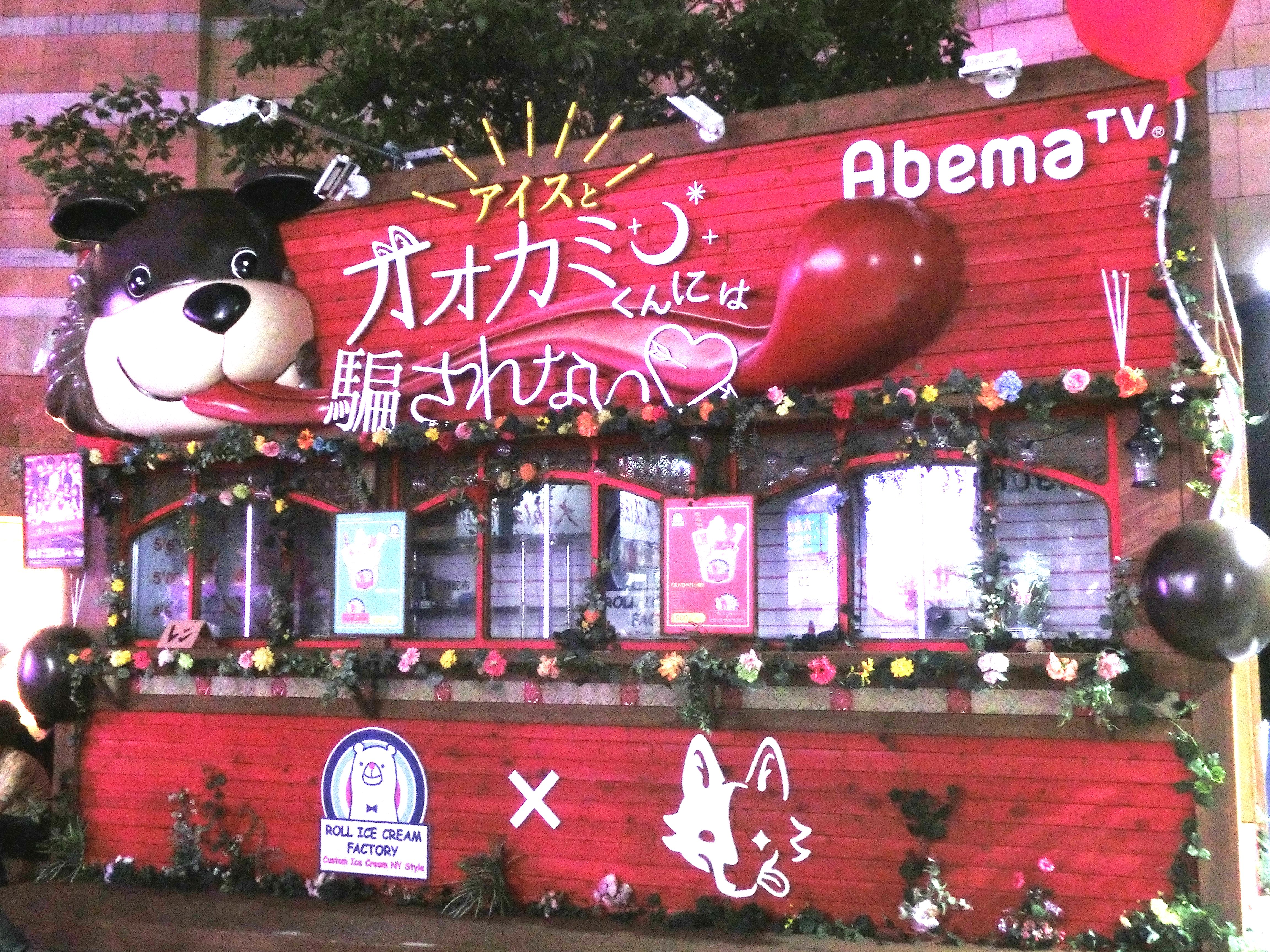 アイスとオオカミくんには騙されない（東京・六本木）